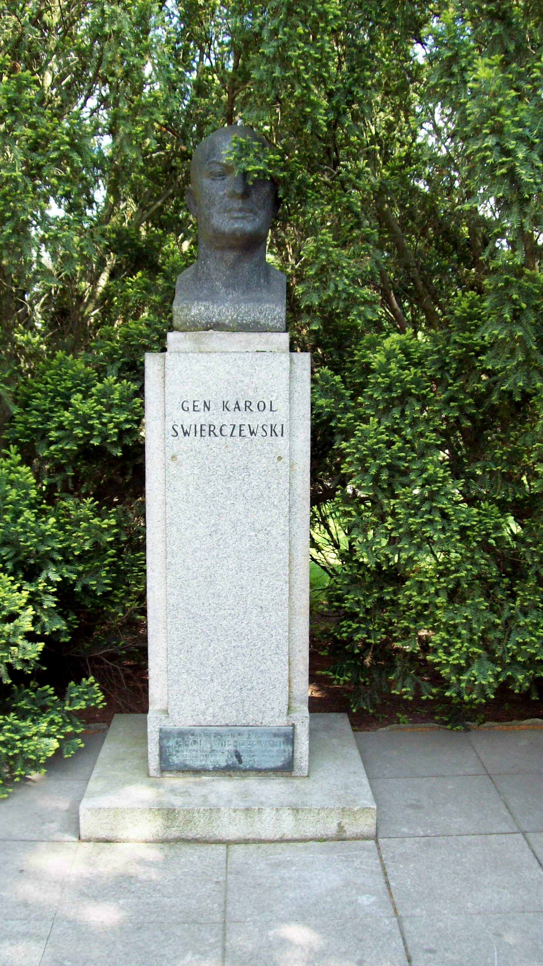 Památník generálplukovníka Karola Świerczewského v parčíku mezi ulicemi Krombholcova a Pražská, u okresního soudu v Mělníku. K. Świerczewski byl velitelem 2. polské armády, která se podílela na osvobození Československa v roce 1945. .